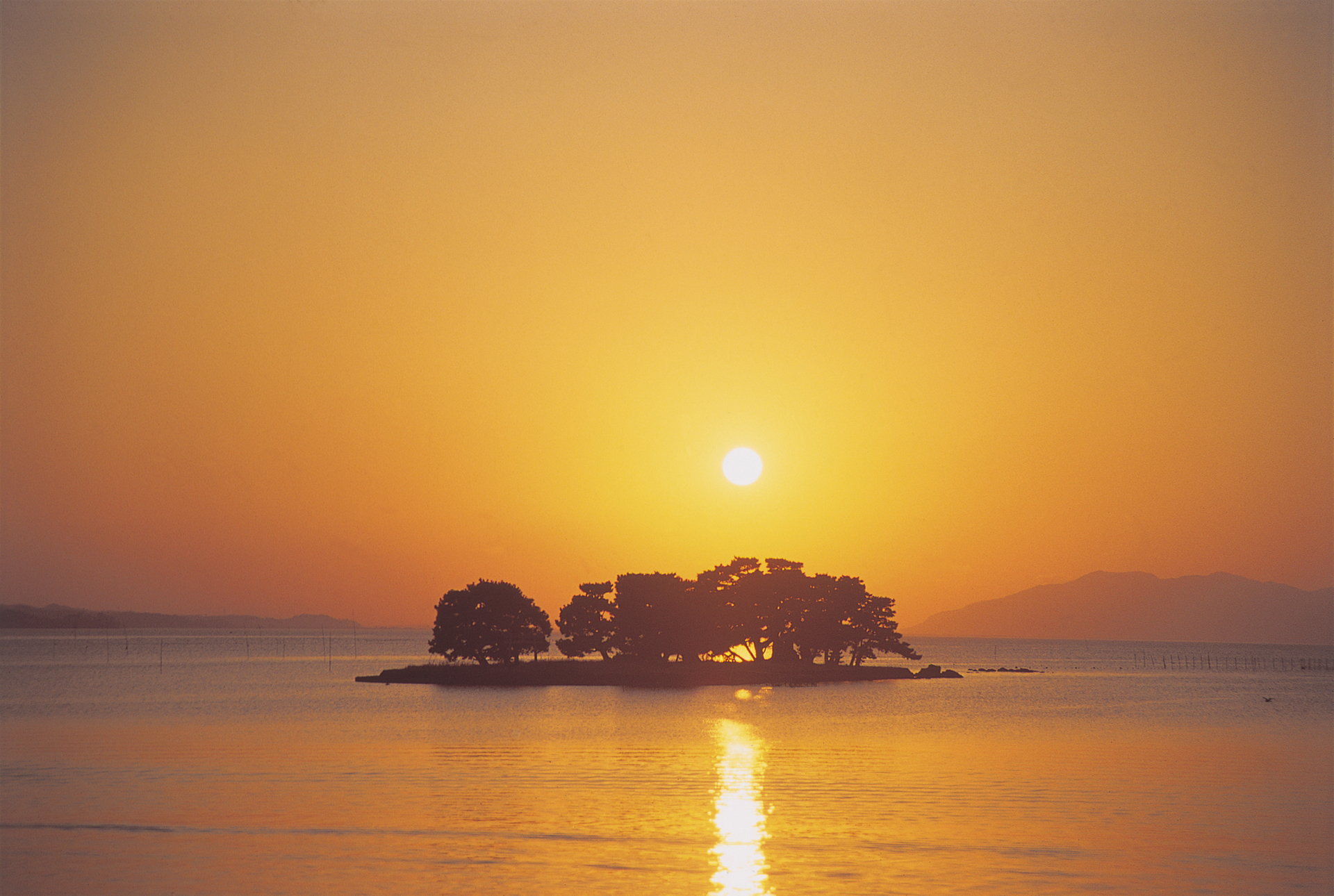 「島根県 宍道湖」FIND/47プロジェクトより